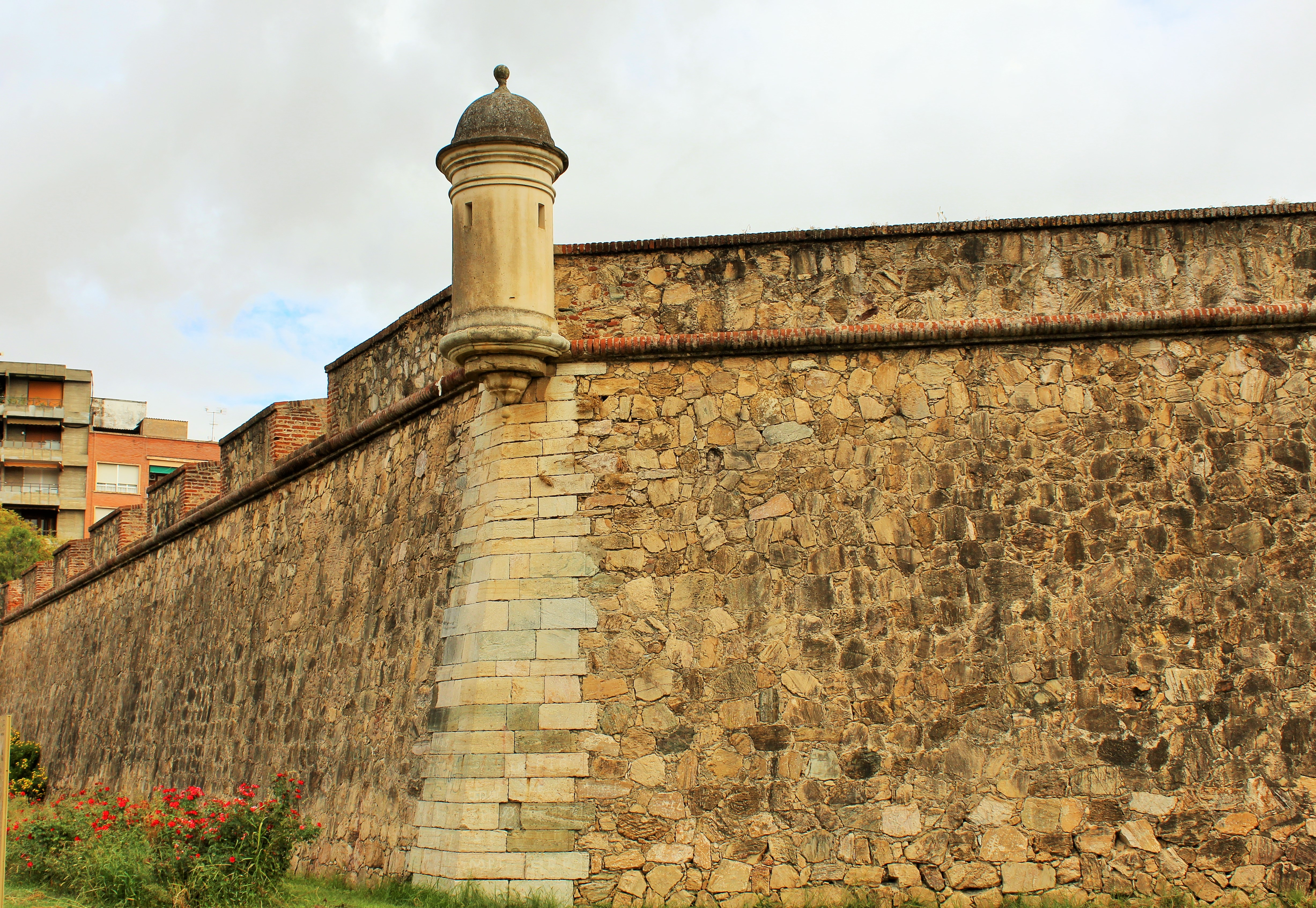 Lienzos sur y oeste. Garita en la unión.